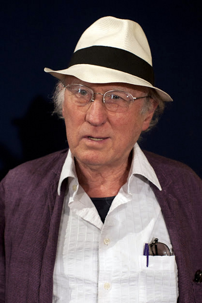 Le psychanalyste et écrivain Jean-Jacques Moscovitz, 2015